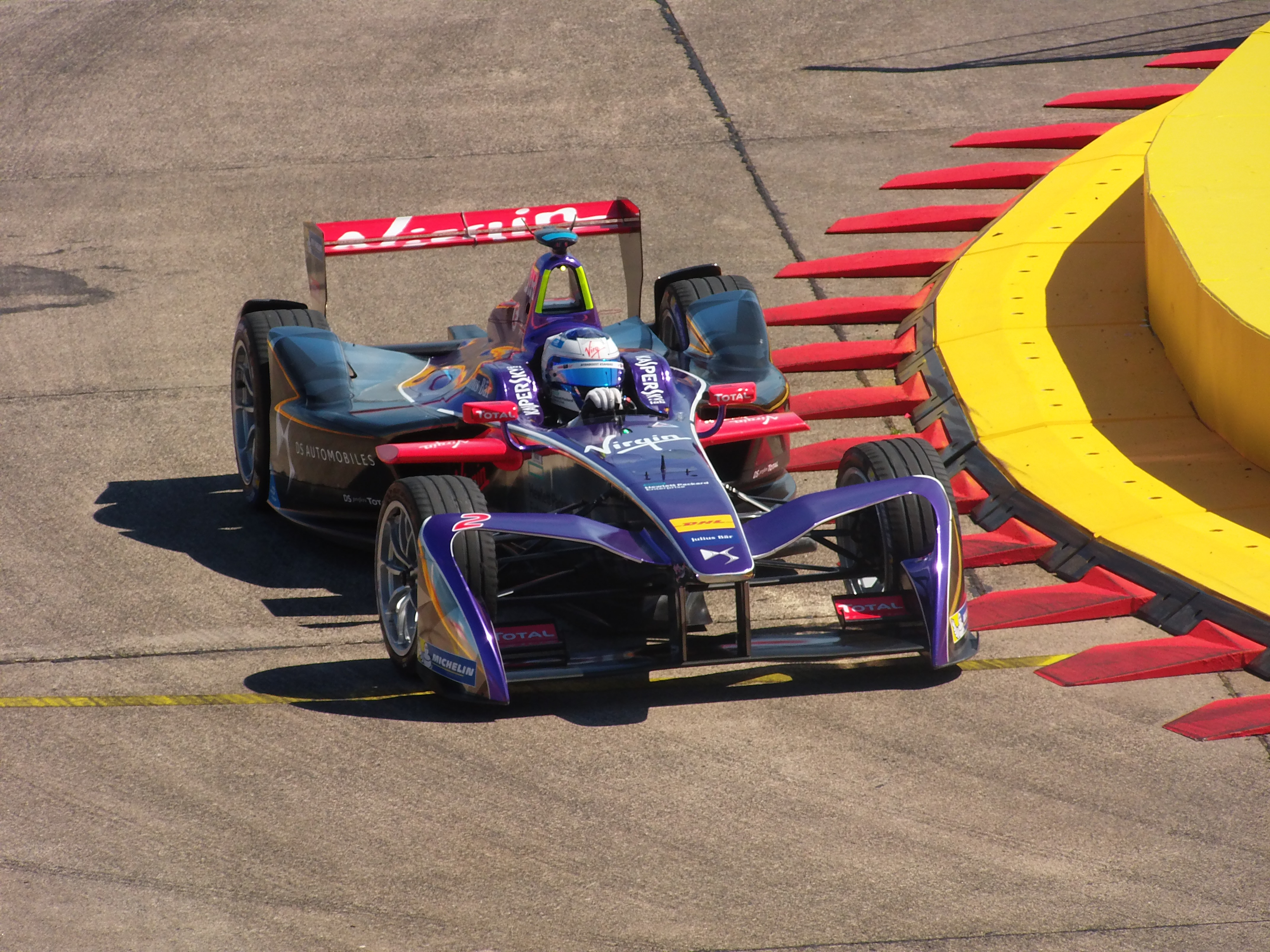 Sam Bird (DS Virgin) beim Berlin ePrix 2017